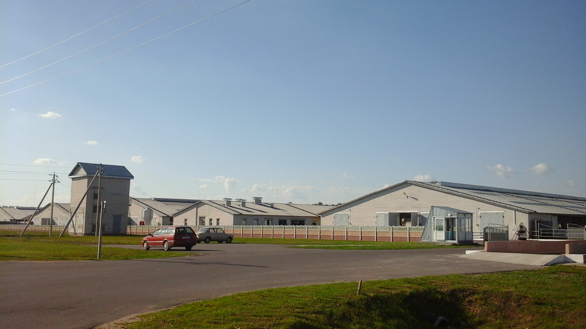 Новая ферма в деревне Ходевляны